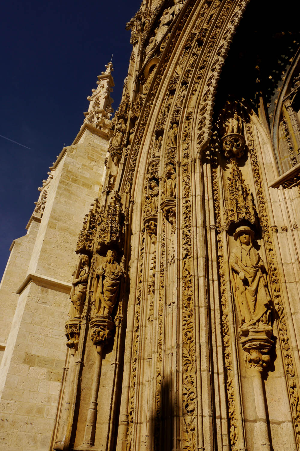 Detalle de la portada de la Iglesia de Santa María la Real de Aranda de Duero en Burgos (España), obra de Simón de Colonia.